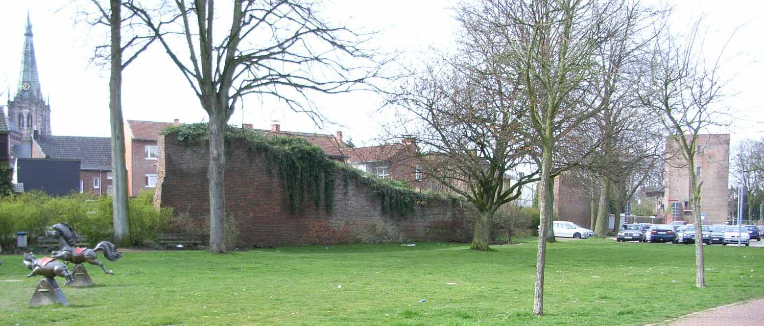 Reste der Stadtmauer und Burgturm an der Wallstraße